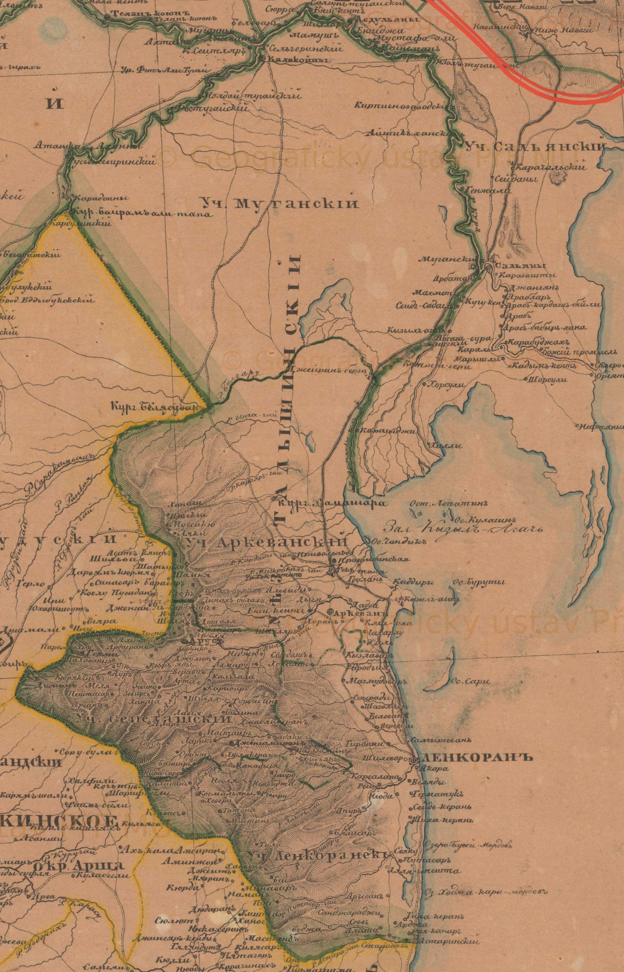 Название: Фрагмент из Карты Кавказского края 1842 года с Талышинский уездом